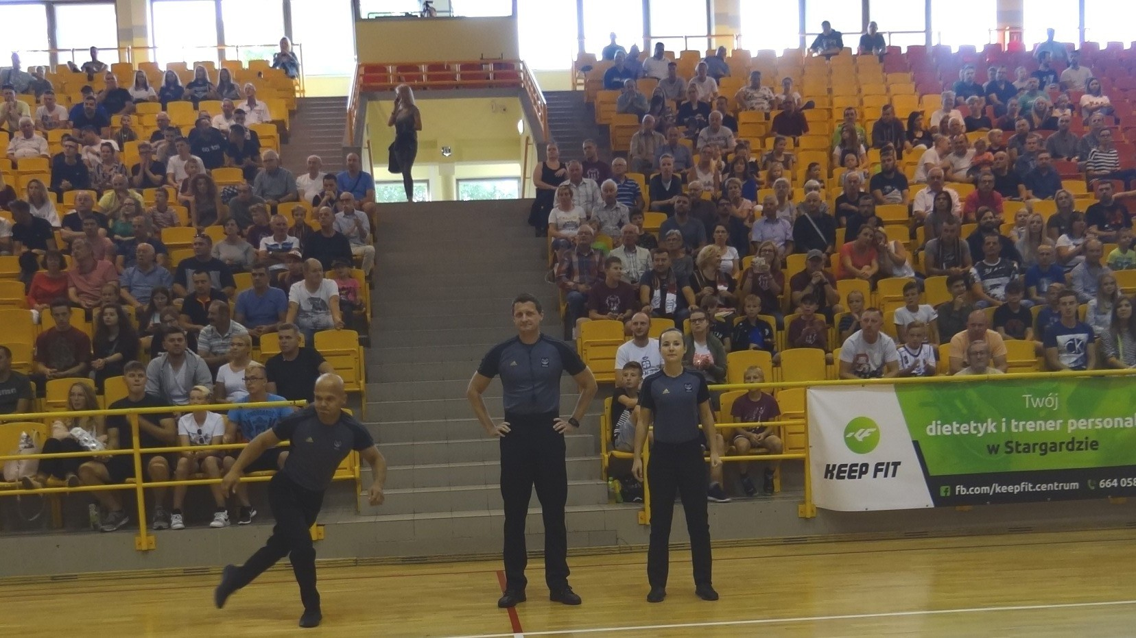 Sędziowie sparingu z Energą Kolobrzeg (01.09.2018)